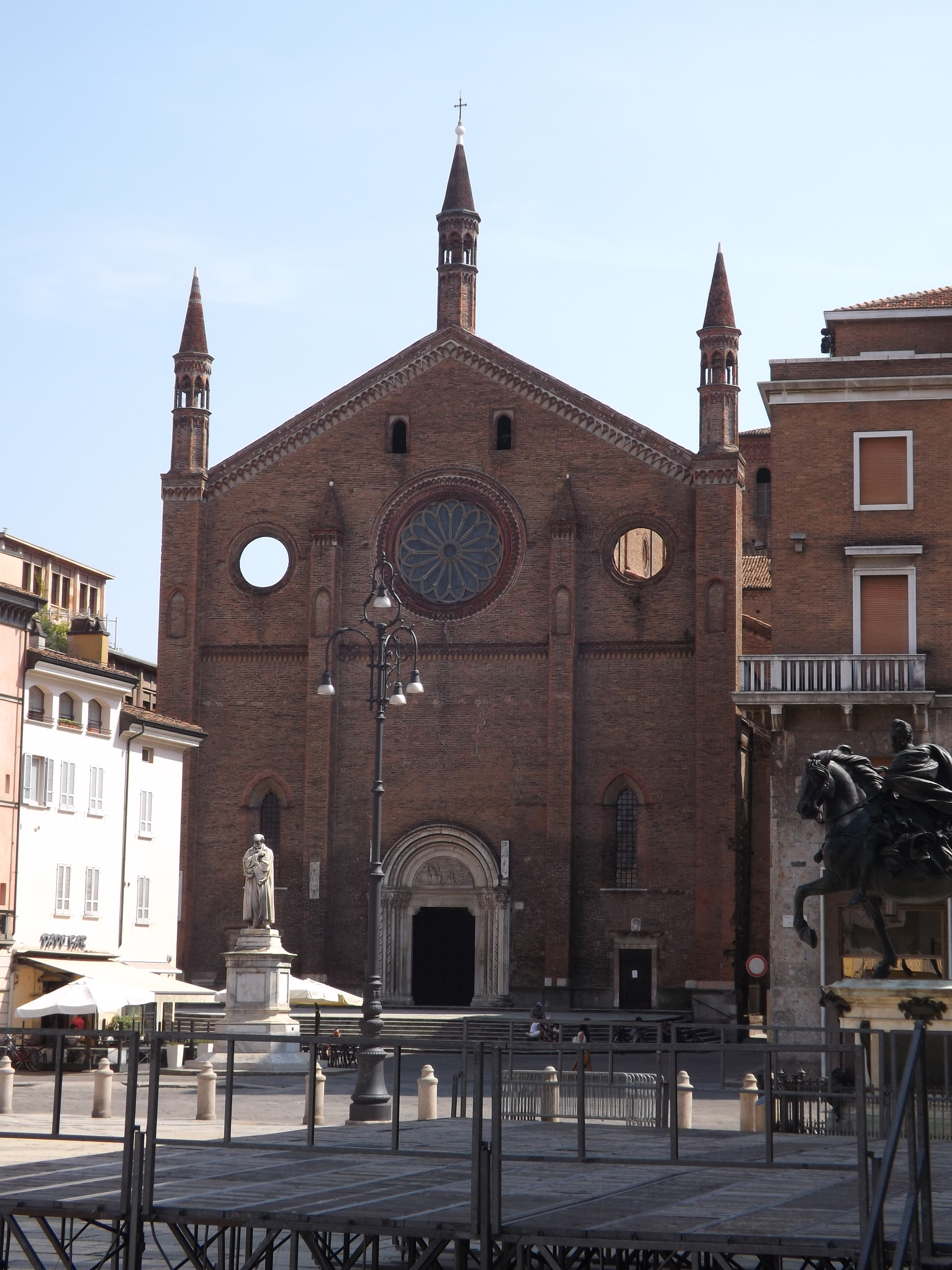 Chiesa di san Francesco - Piacenza